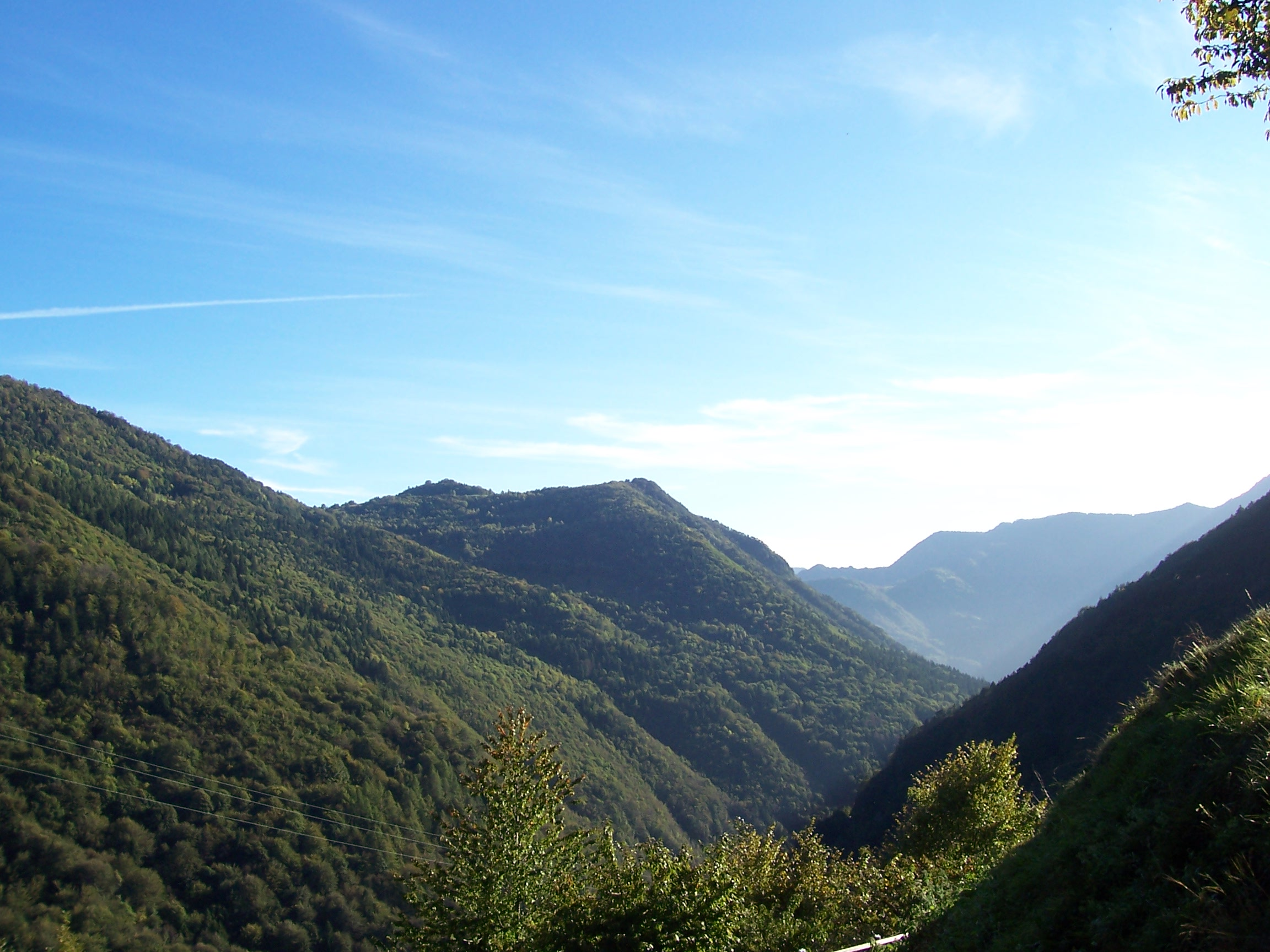 Monte Camiolo nel comune di Valvestino in provincia di Brescia